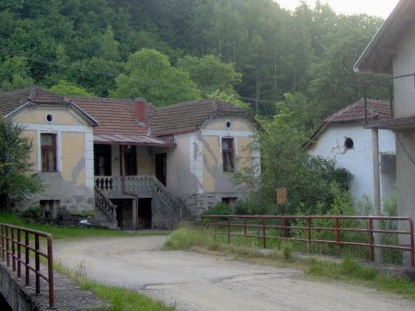 Ruplje